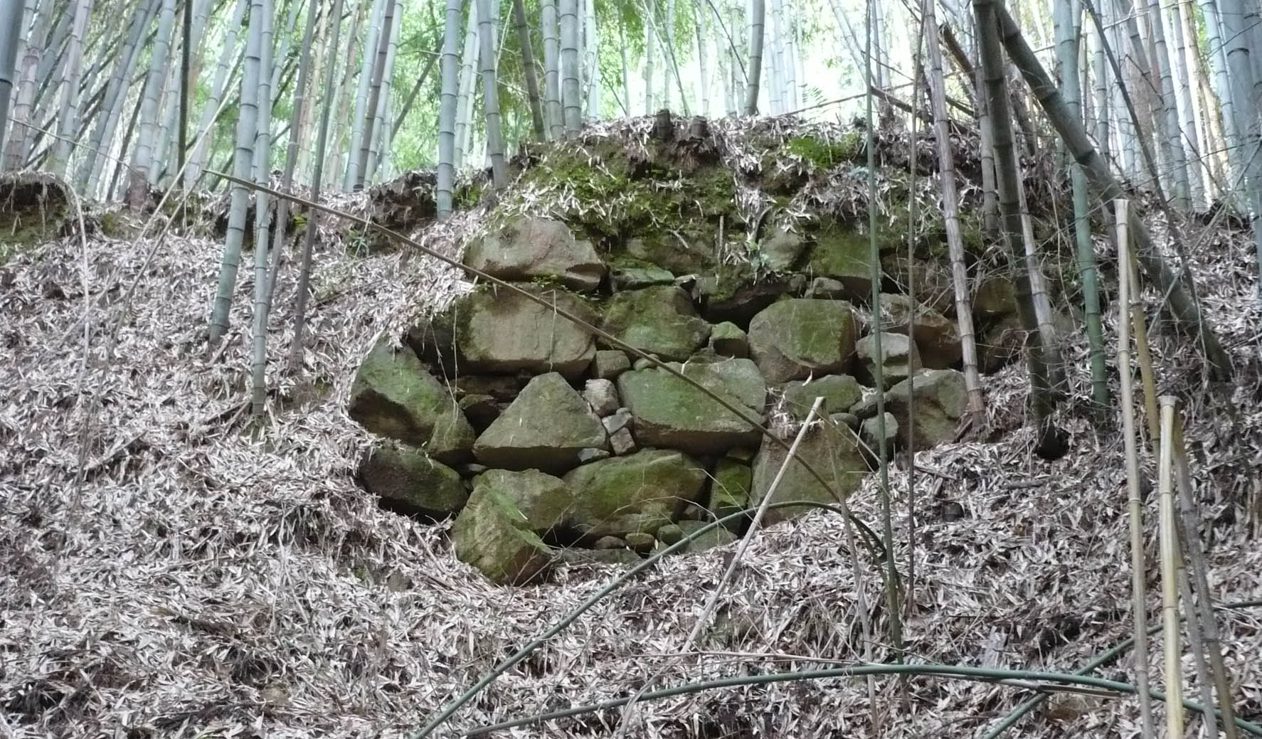 大石垣